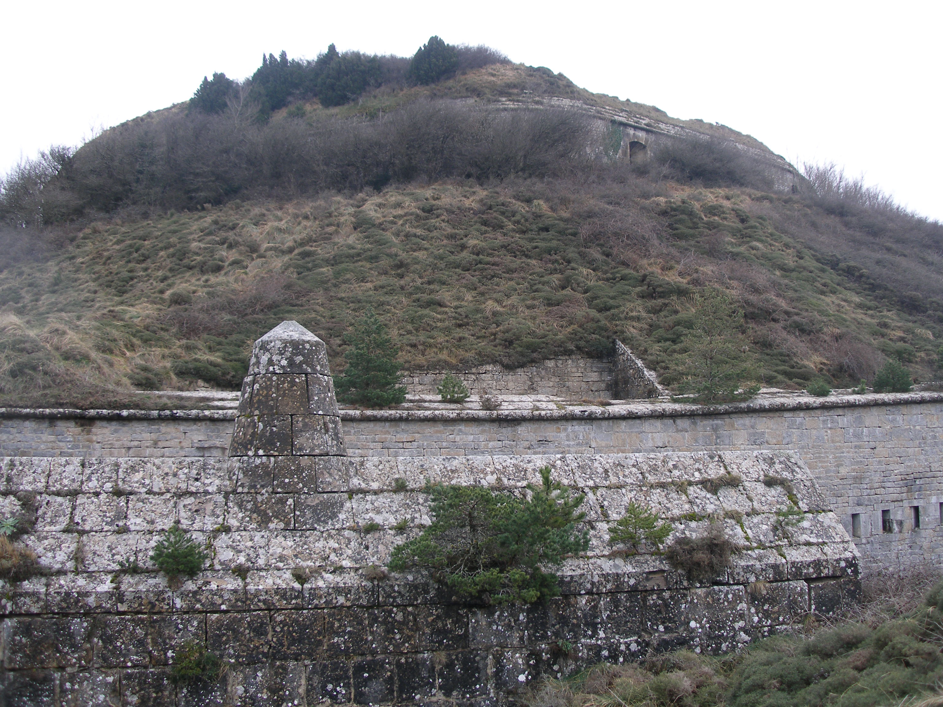 Cara norte, posterior del fuerte San Cristóbal